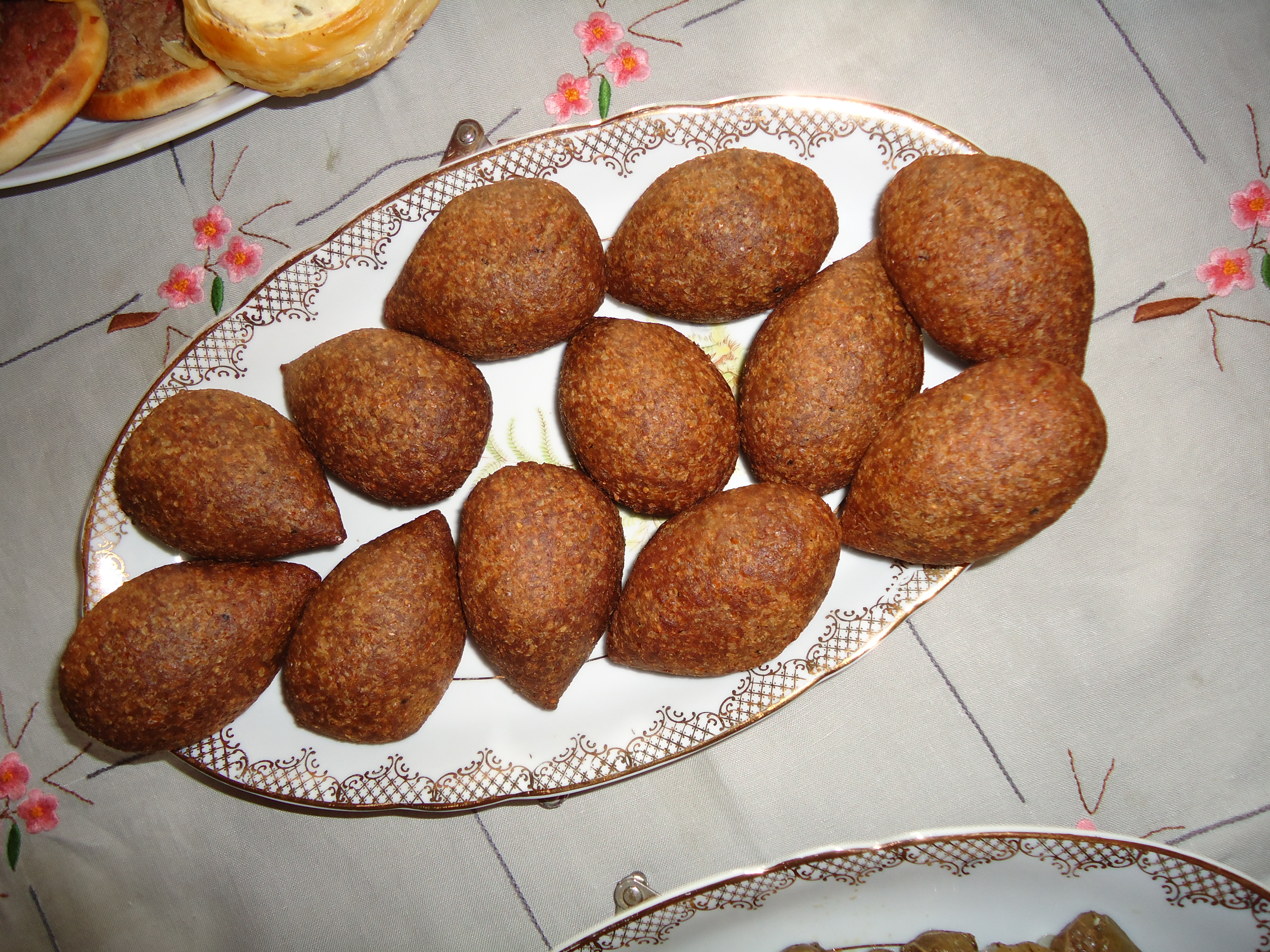 Quibes feitos em S.Paulo